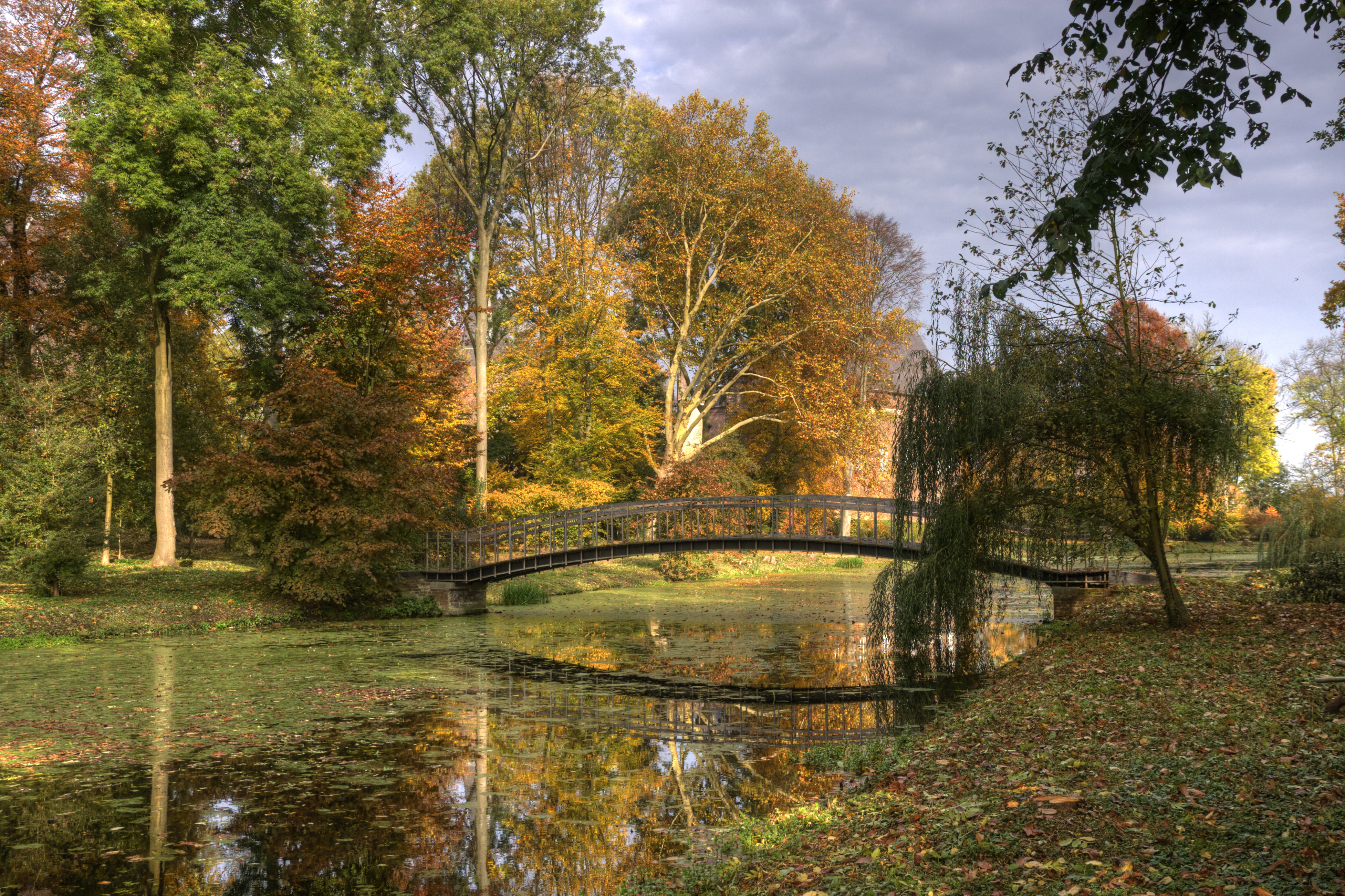 Herfstbeeld van het landgoed rond Kasteel Horn.